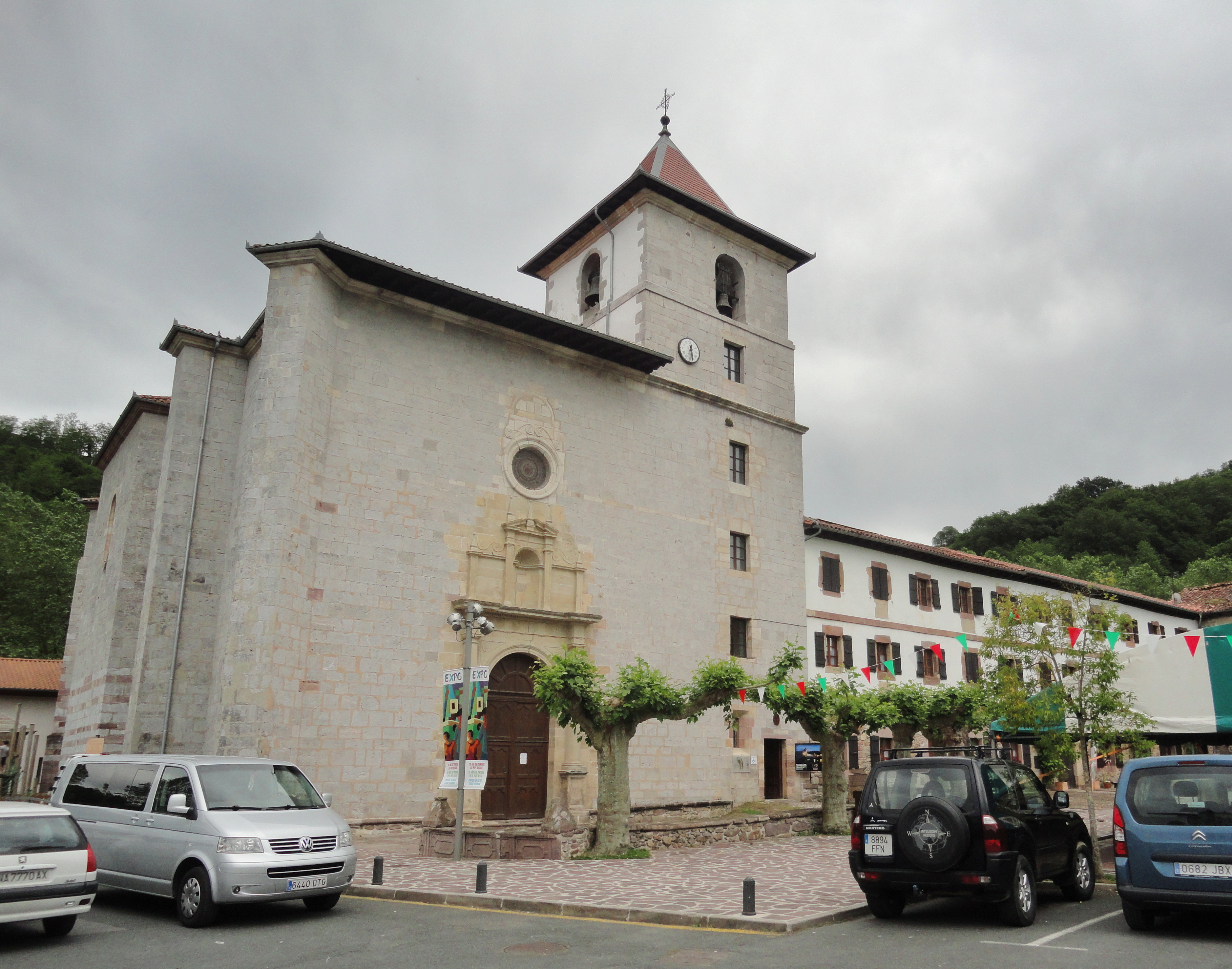 San Salvatore eliza - Urdazubi